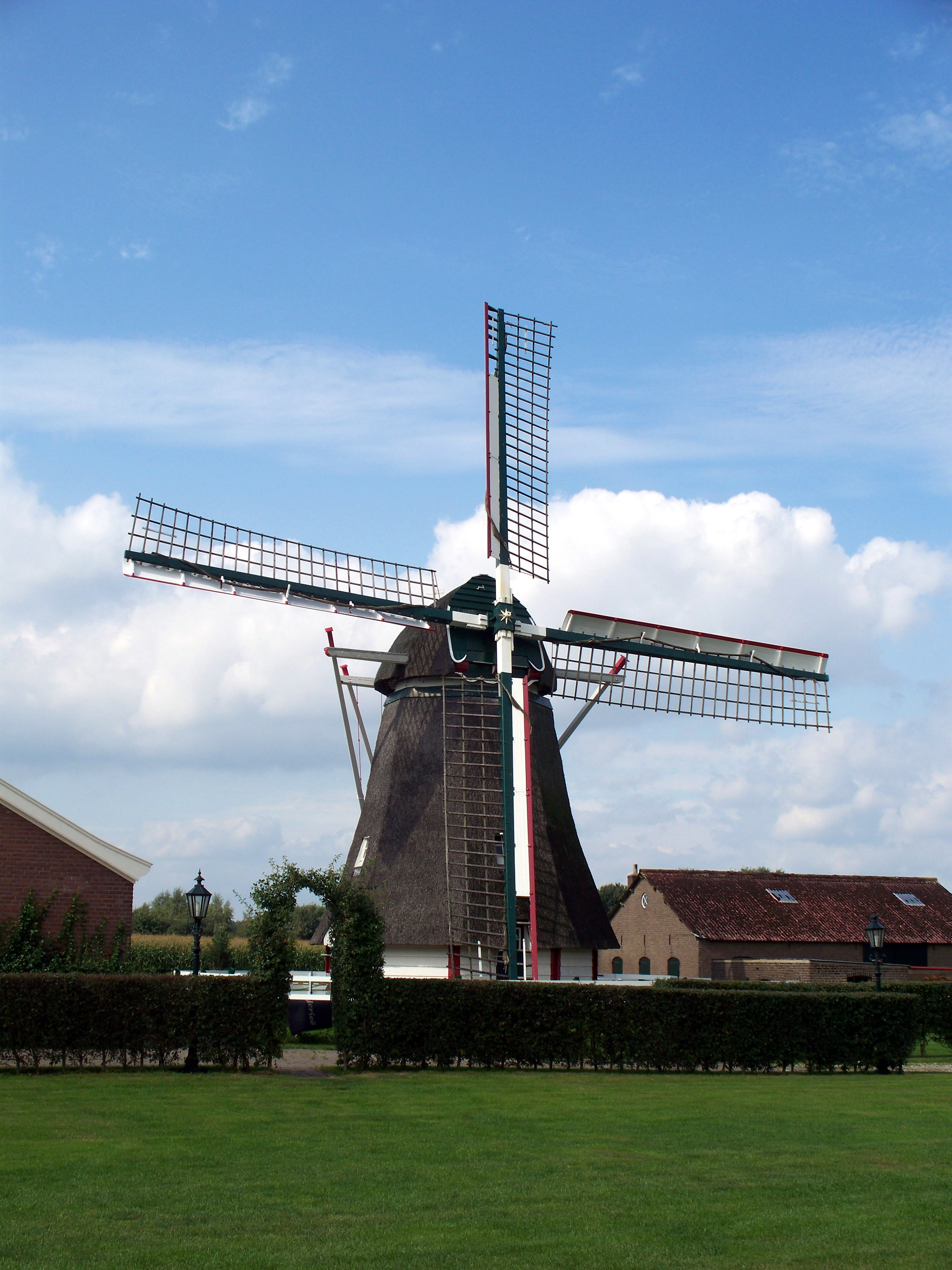 Warkensemolen te Warken, Lage Lochemseweg